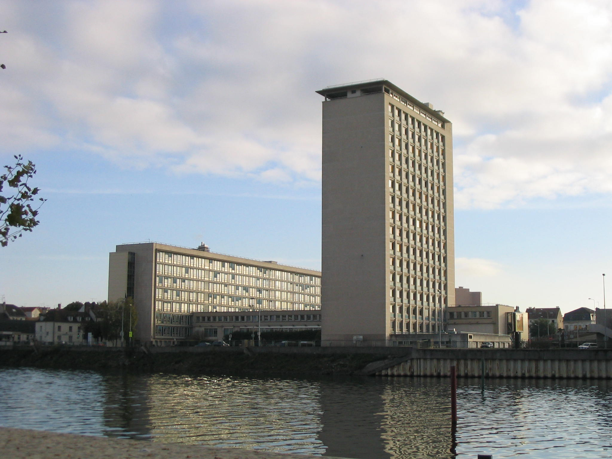 La cité administrative de Melun, dans le quartier Saint Barthelémy.